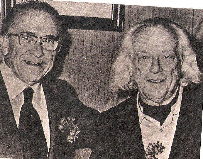 Santiago Carrillo, politico español del PCE, y Rafael Alberti, poeta español